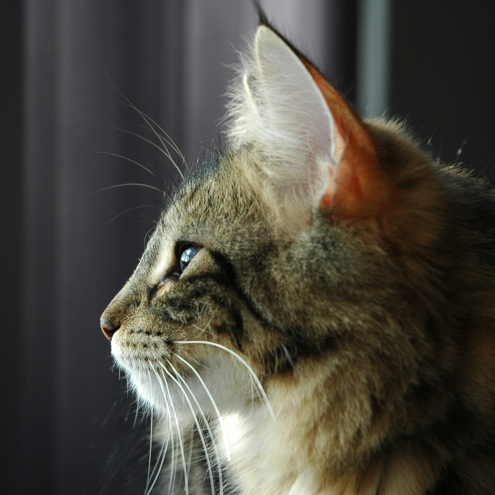 Aysha